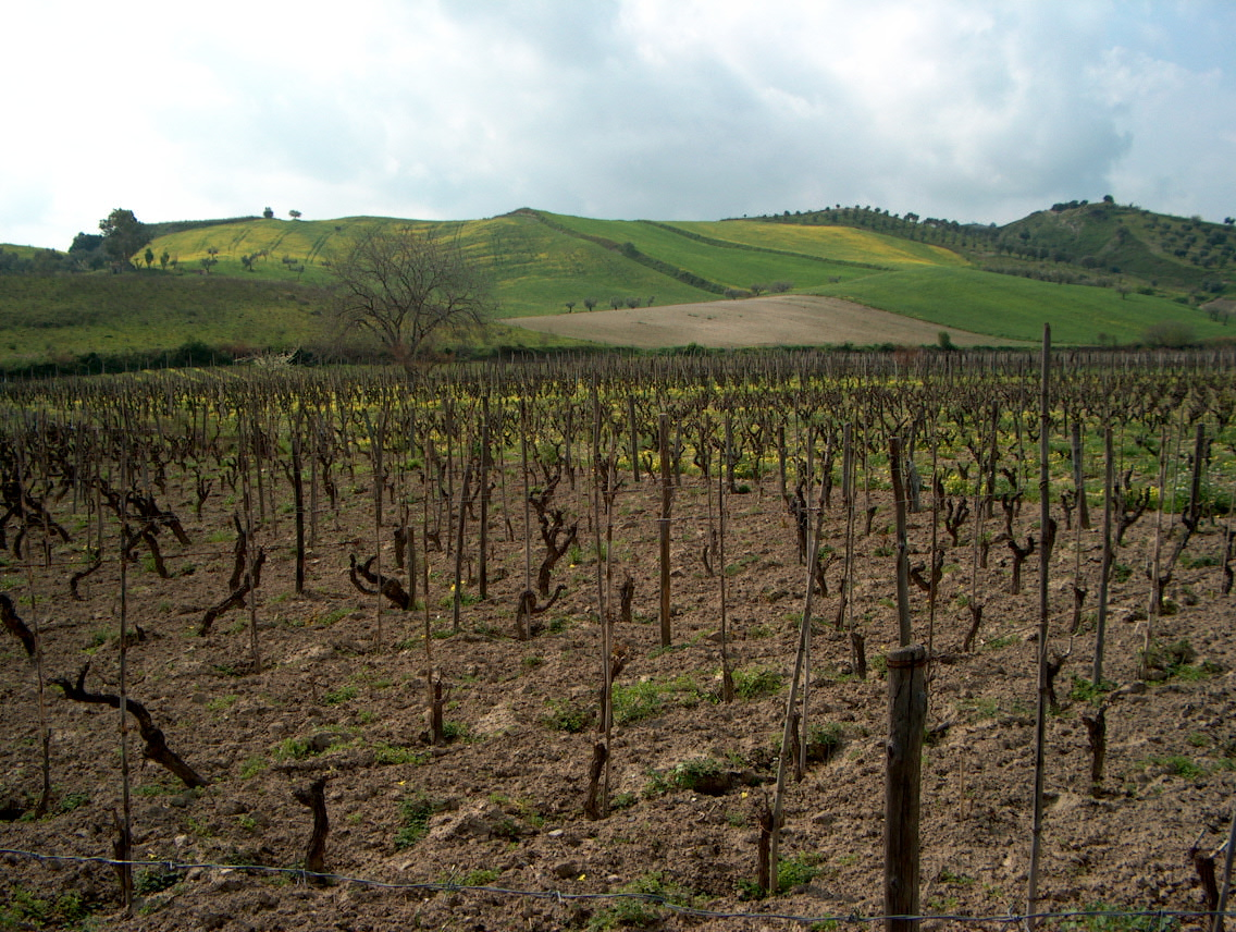 Vigneto del vino Cirò